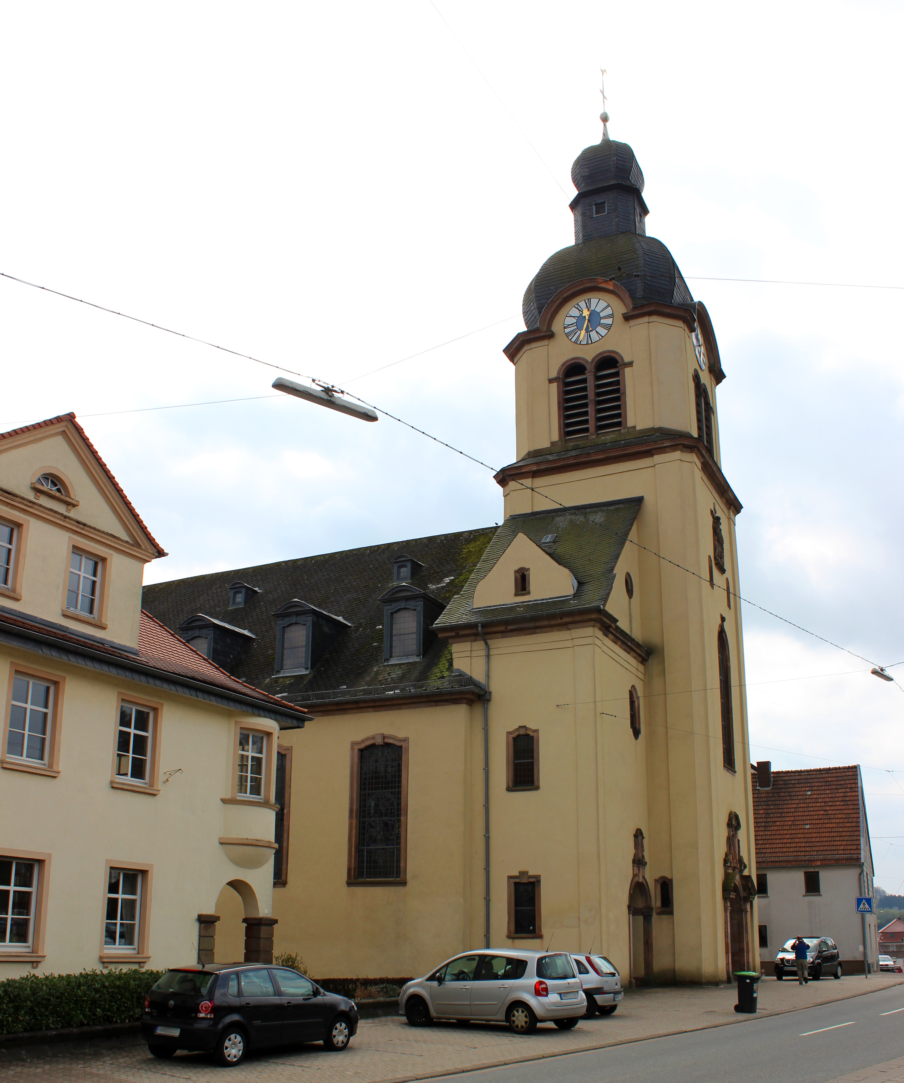 Die katholische Pfarrkirche St. Franziskus in Urexweiler, einem Ortsteil der Gemeinde Marpingen, Landkreis St. Wendel, Saarland